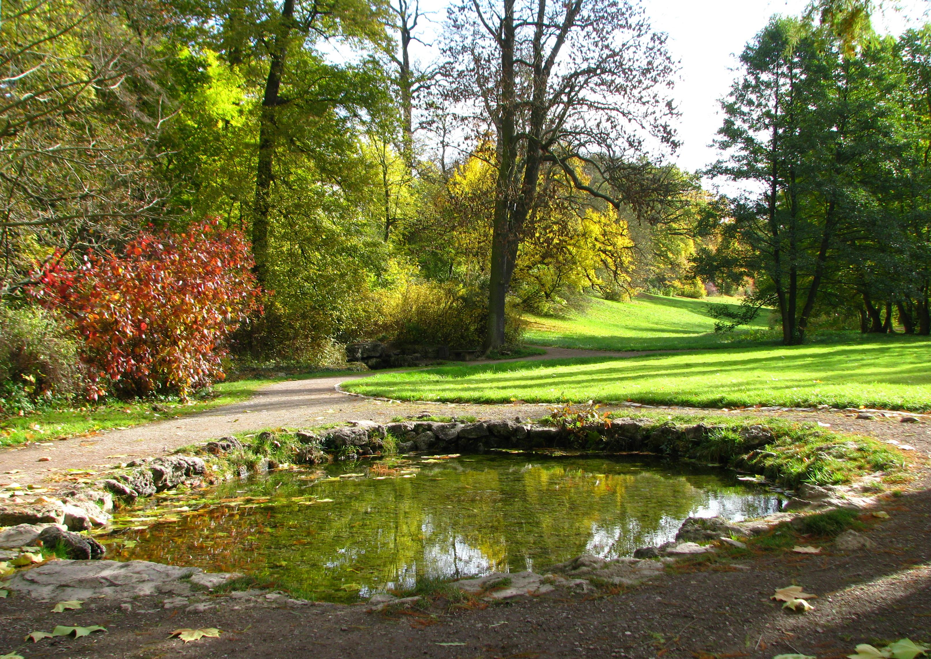 Das Ochsenauge, eine der drei Leutraquellen im Weimarer Ilmpark.